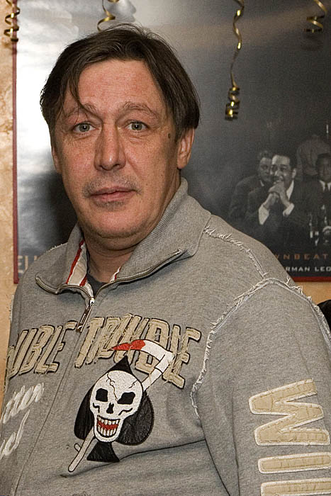 актёр Михаил Ефремов, Заслуженный артист РФ